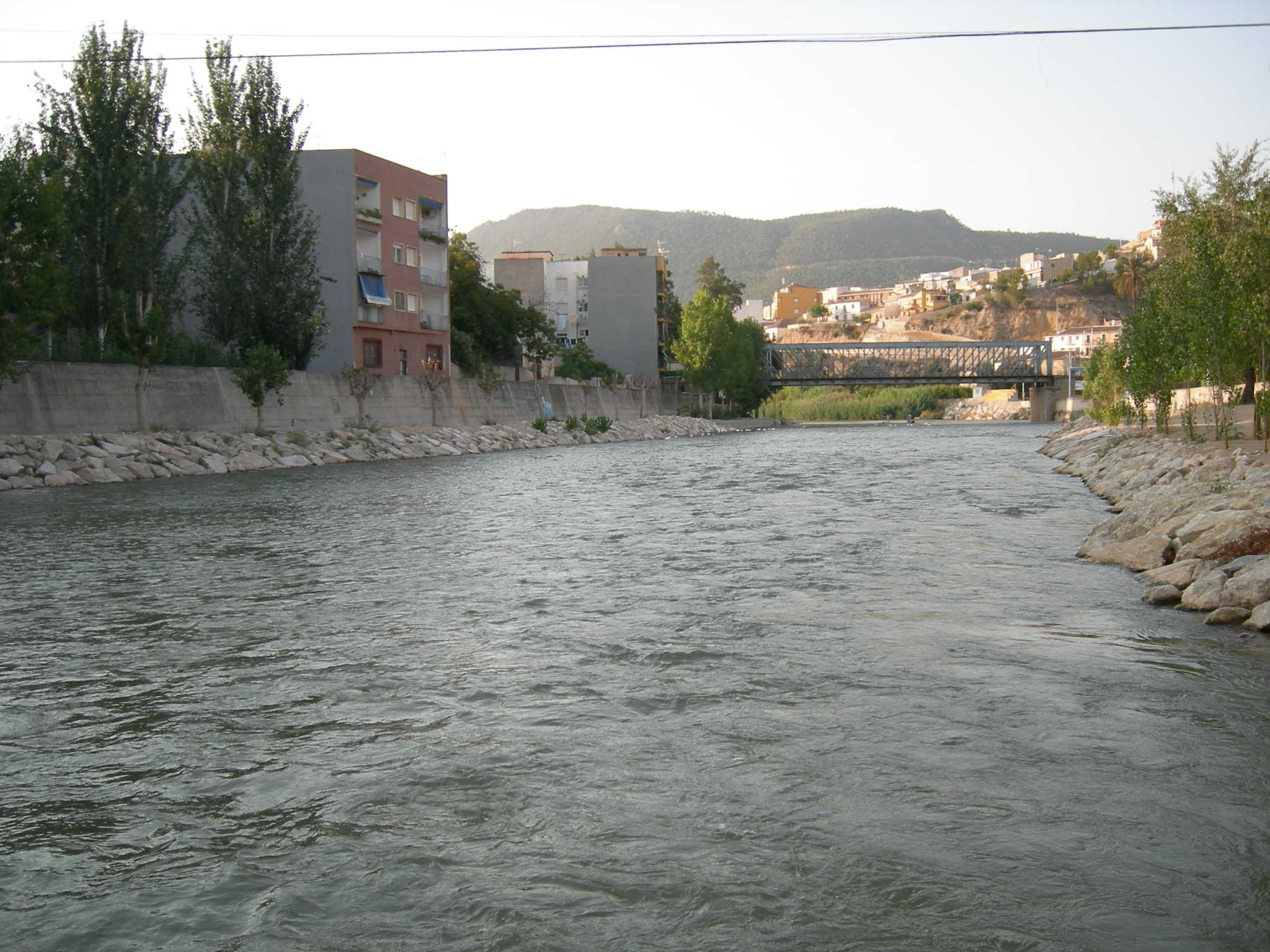 Blanca (Murcia)